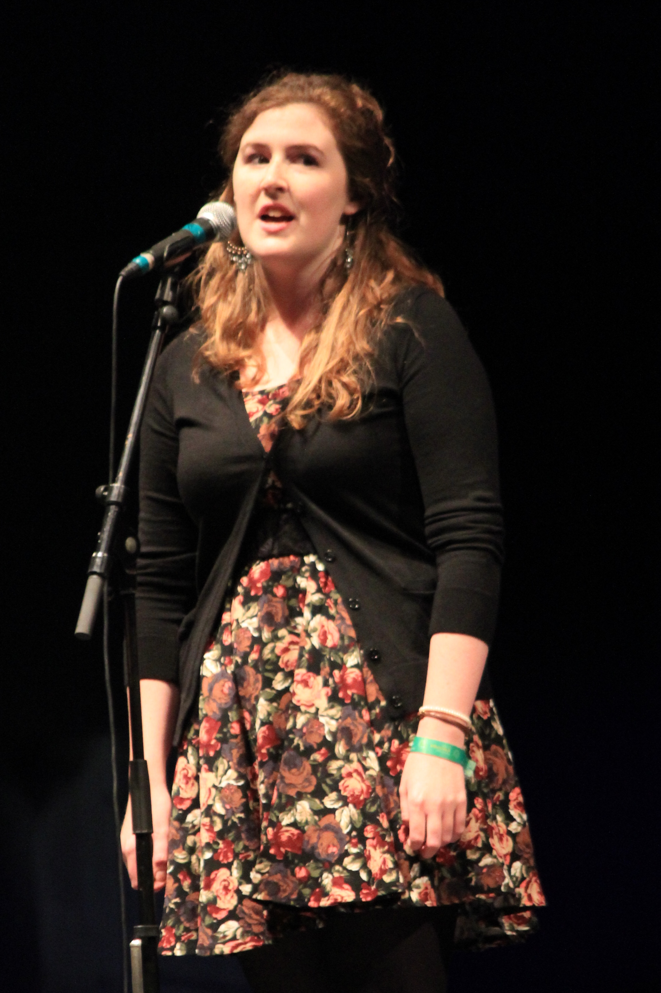 Concert d'Aife Scott lors du spectacle "Femmes Gaéliques" pendant le festival interceltique de Lorient 2014.